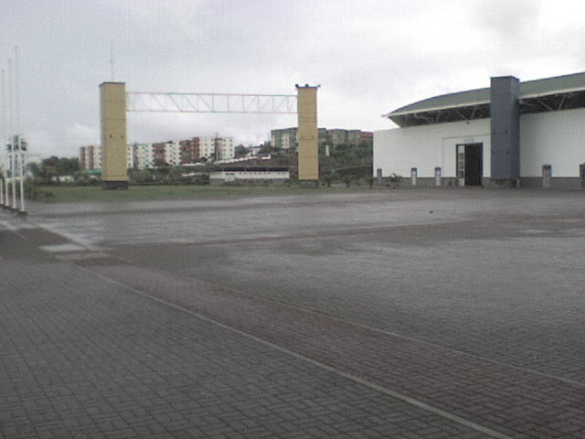 Centro de Convenciones Expofuturo Pereira